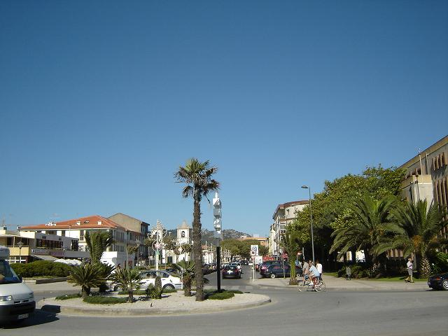 Freguesia de Esposende, Portugal.